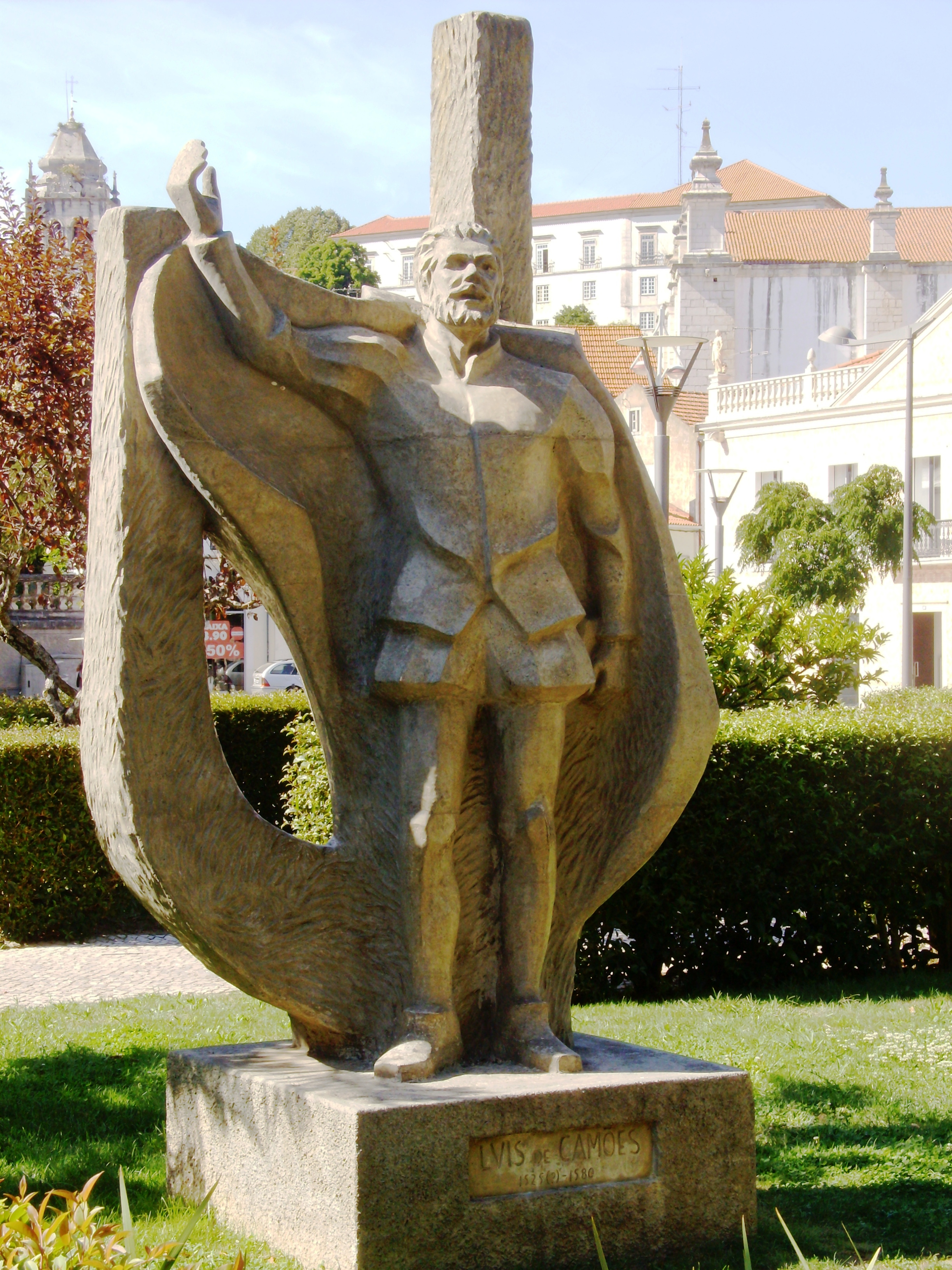 Luís de Camões (Fernando Marques, 1980): Jardim Luís de Camões, Leiria, Portugal. Materiais: betão (escultura e pedestal). Foi inaugurada em 10 de junho de 1980, no âmbito das comemorações do Dia de Camões e das Comunidades.